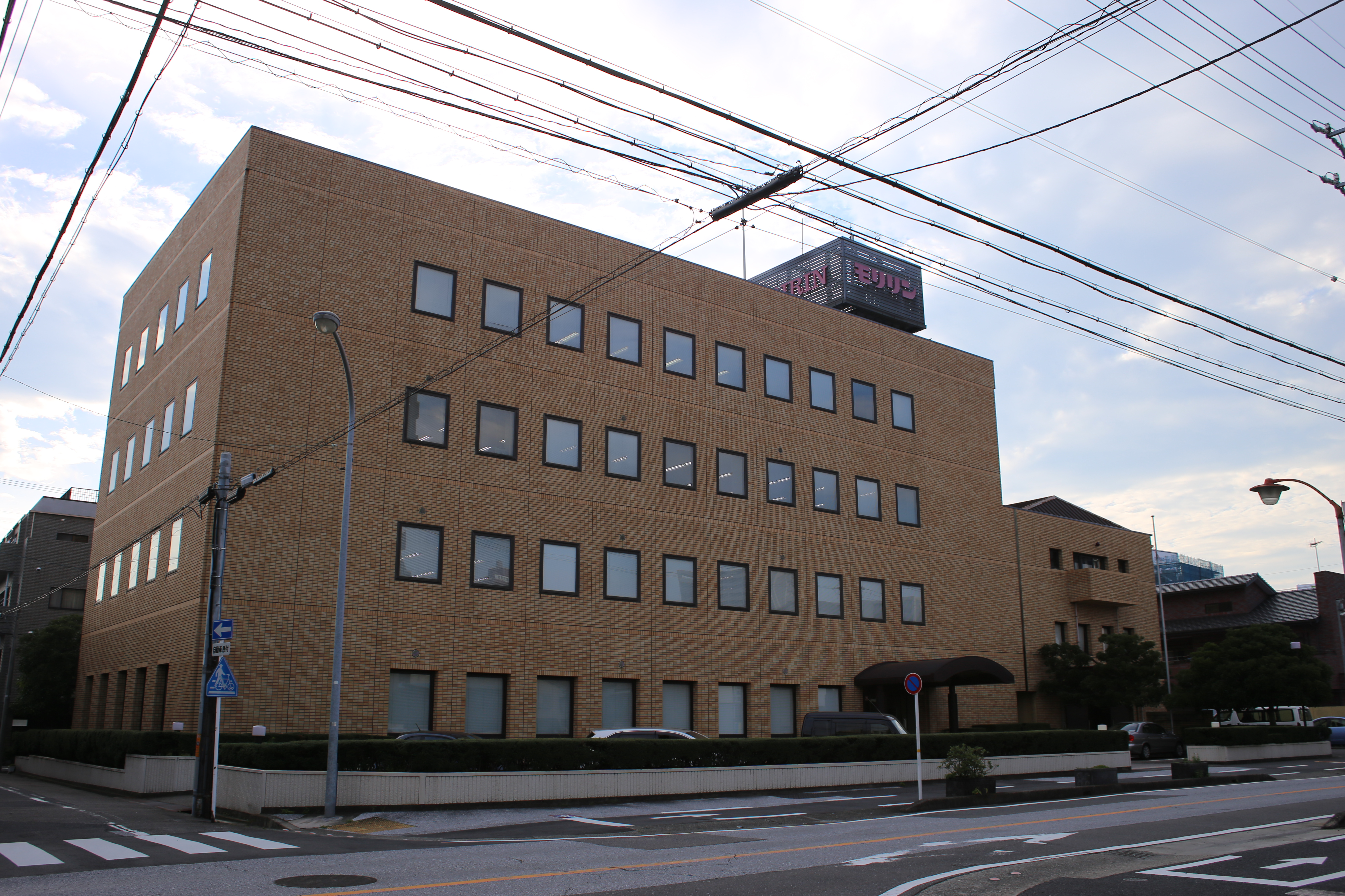 一宮市本町四丁目のモリリン本社を東側公道南側より撮影